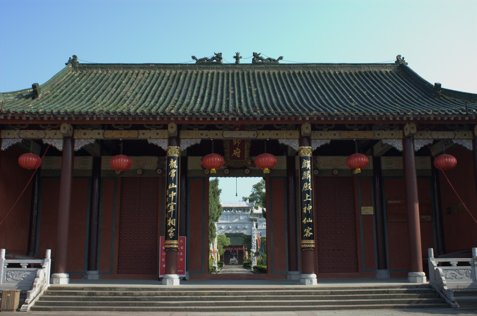 江西鹰潭龙虎山嗣汉天师府